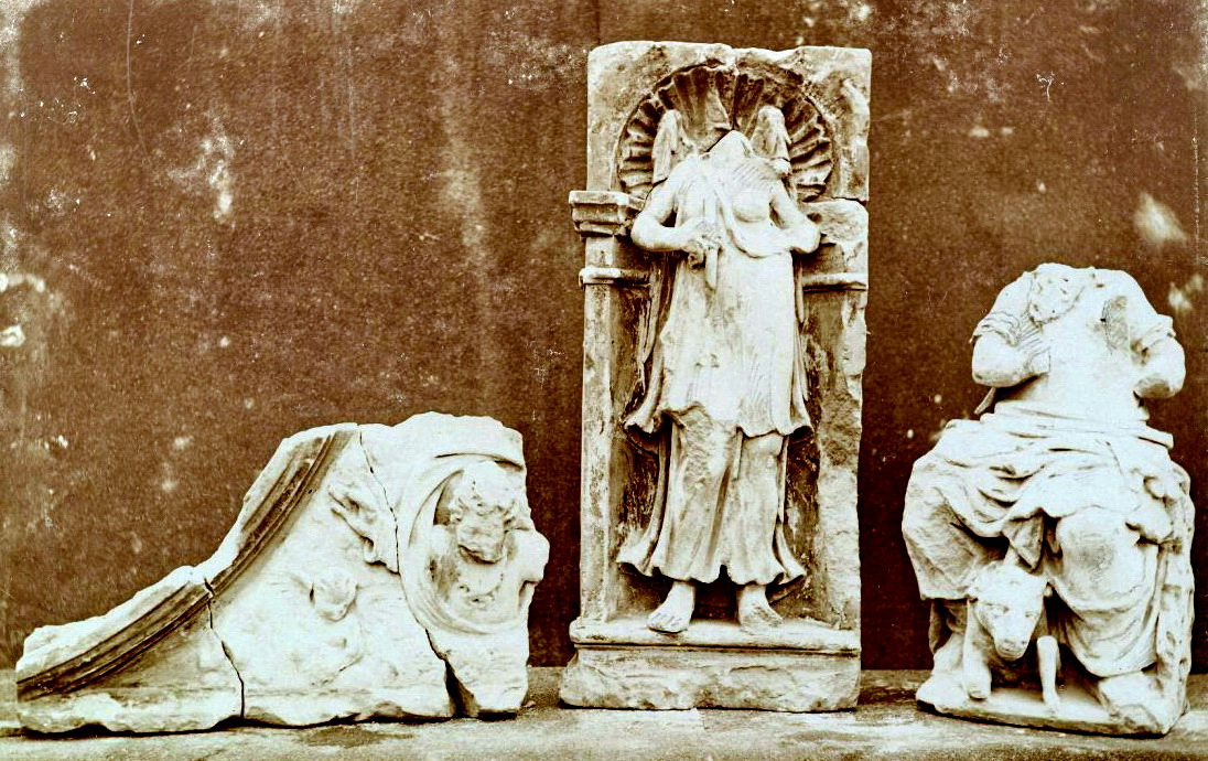 Fragmenten beeldhouwwerk gevonden in 1914 onder de kerkvloer tijdens restauratiewerkzaamheden in de Kruisherenkerk in Maastricht. Voorheen in de collectie van het historisch museum, thans Bonnefantenmuseum(?).